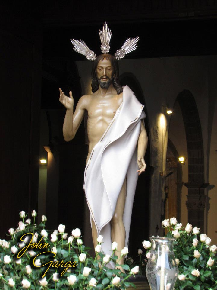 Santísimo Cristo resucitado. Obra del escultor Ezequiel de León, para la Parroquia de Santo Domingo de Guzmán de La Villa de La Orotava, en 1996.